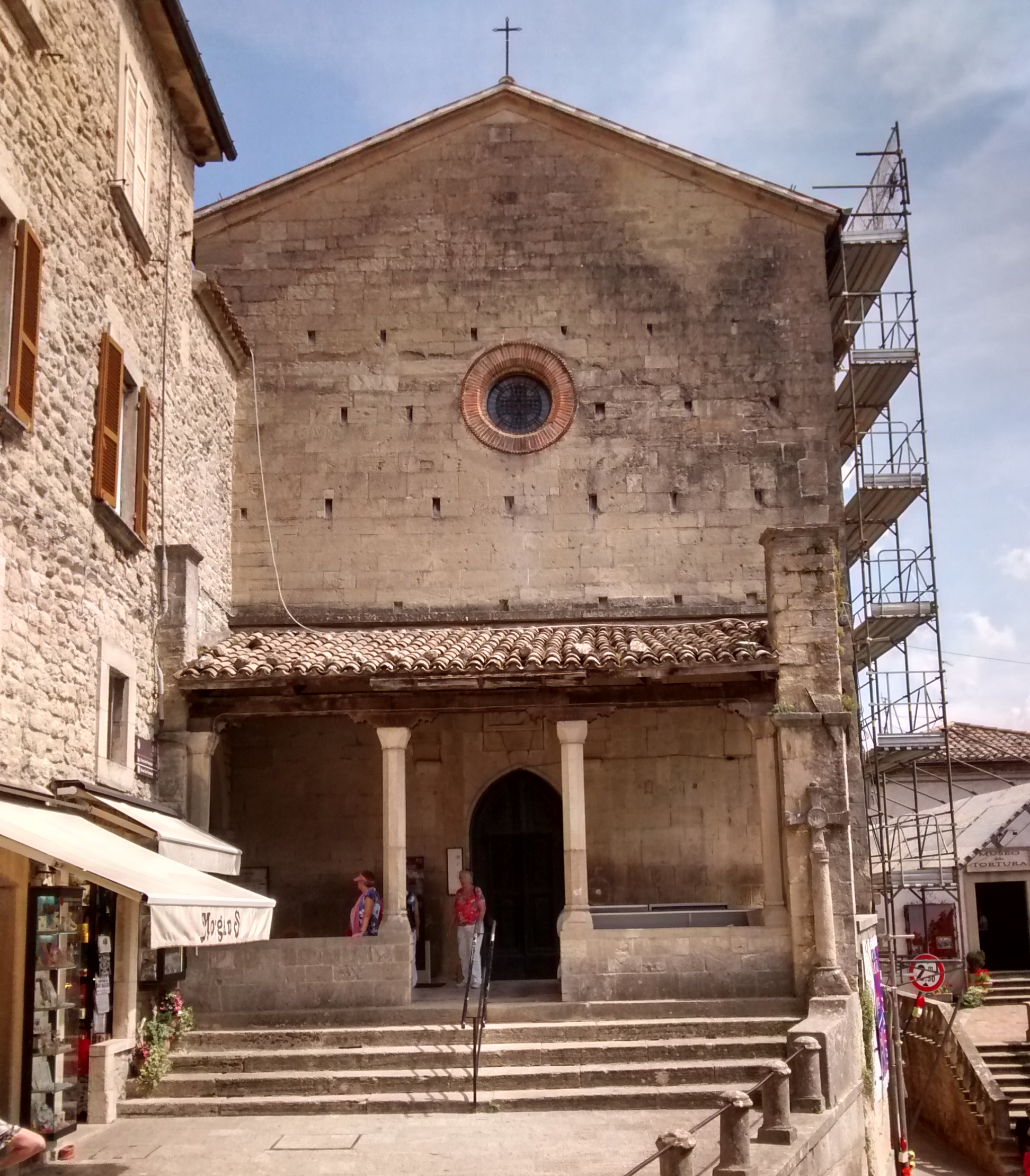 Chiesa di San Francesco (San Marino)